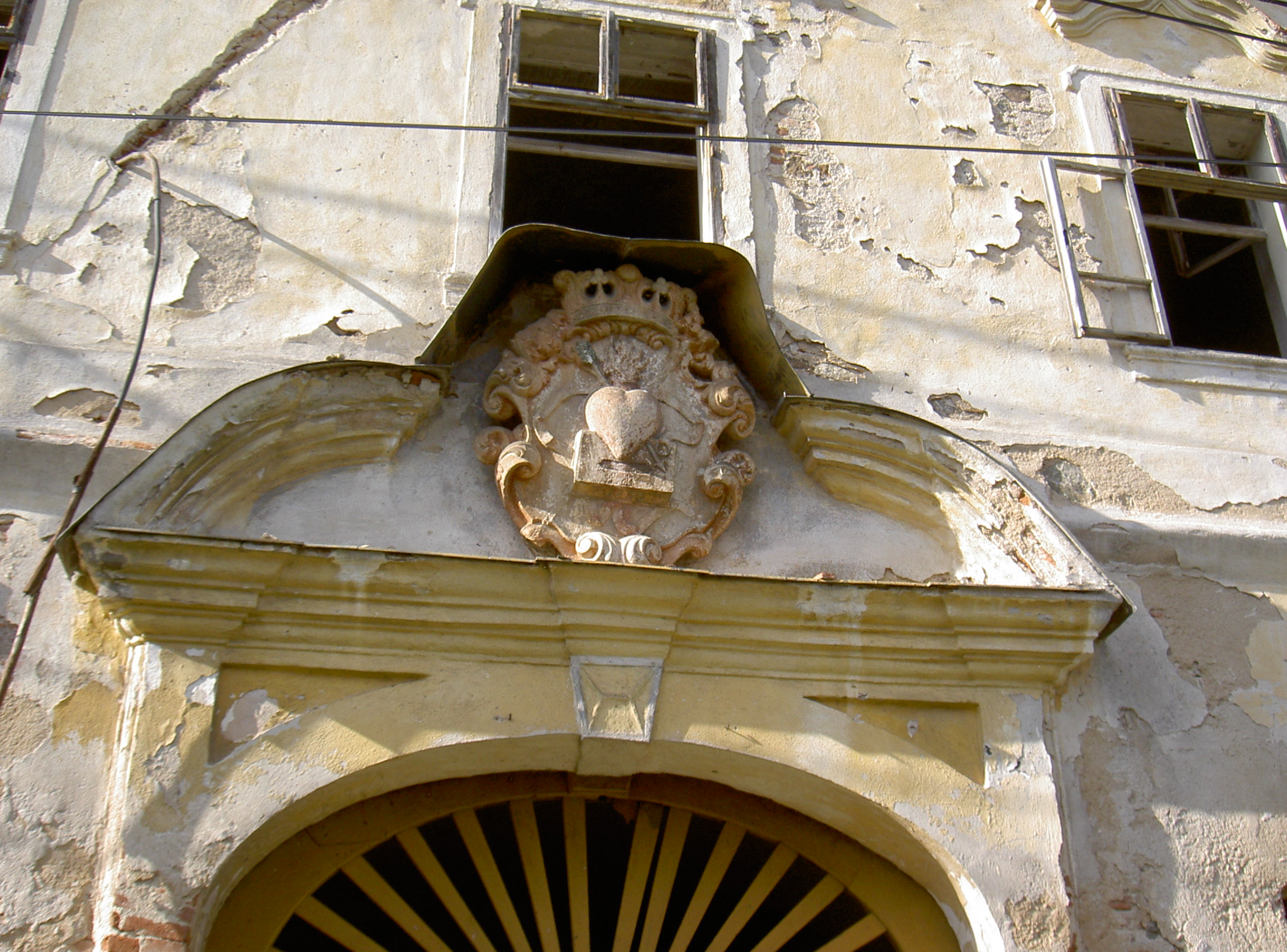 Schloss in Ždánov (okres Domažlice), ehemals zum Augustinerkloster Pivoň gehörig